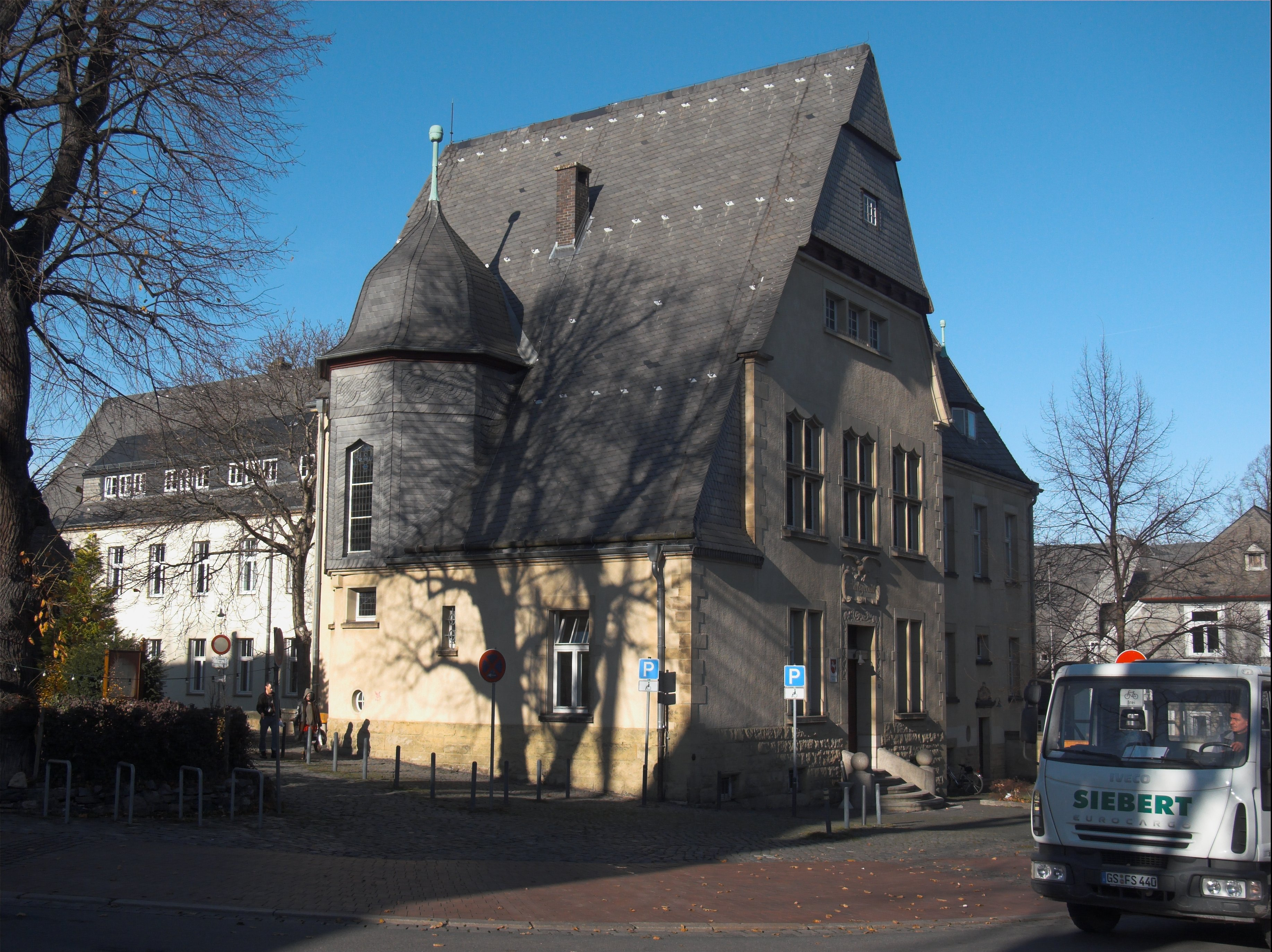 Gebäude des Amtsgerichts Goslar